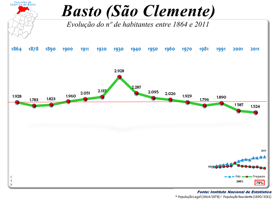 Censos 1864/2011